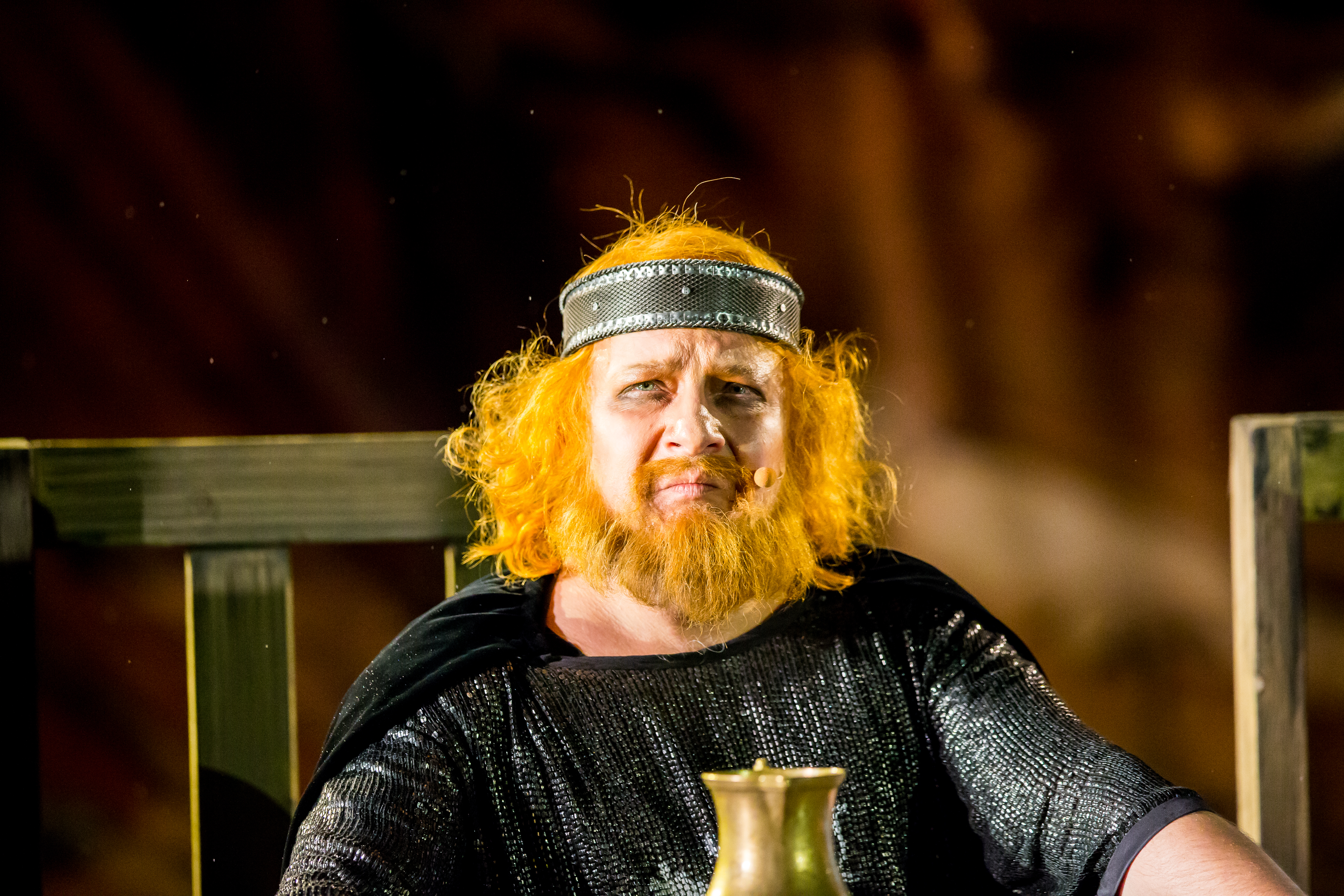 Nibelungenfestspiele Worms Gemetzel 2015 Nordseite Wormser Kaiserdom Nico Hofmann (Intendant), Albert Ostermaier (Autor), Thomas Schadt (Regisseuer) Enemble: Alina Levshin (Ortlieb), Maik Solbach (Narr), Judith Rosmair (Kriemhild), Catrin Striebeck (Brünhild), Markus Boysen (Etzel), Heiko Pinkowski (Dietrich), Max Urlacher (Hagen), Holger Kunkel (Gunter), Gabriel Raab (Gernot), Peter Becker (Giselher), Tom Radisch (Volker), Marion Breckwoldt (Zofe), Radu Cojocariu (Erzähler)